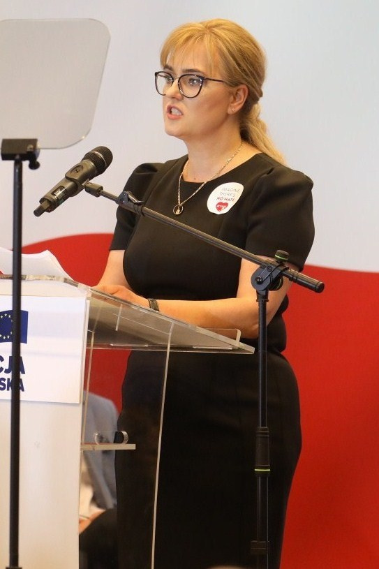 Magdalena Adamowicz, gdańska prawniczka i polityk. Żona Pawła Adamowicza, prezydenta Gdańska.